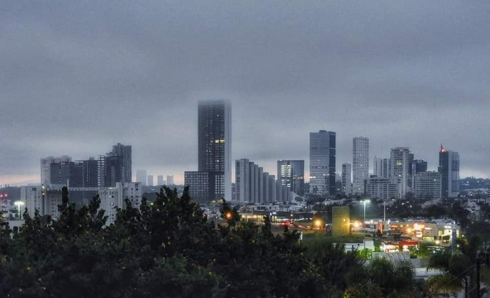 Centro comercial y financiero andares, Zona Metropolitana de Guadalajara, Jalisco.